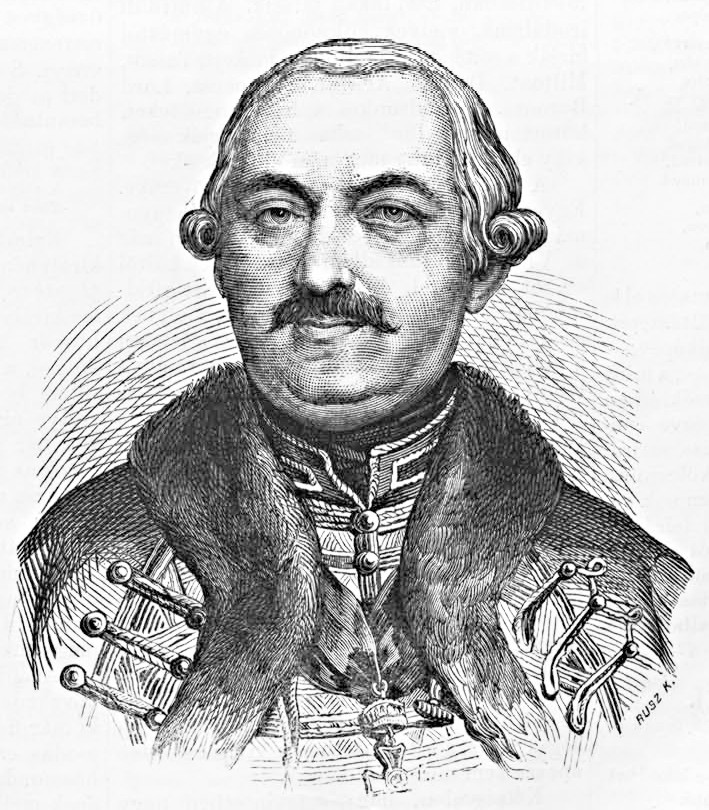 Orczy Lőrinc (1718–1789) költő, hadvezér portréja. Rusz Károly metszete